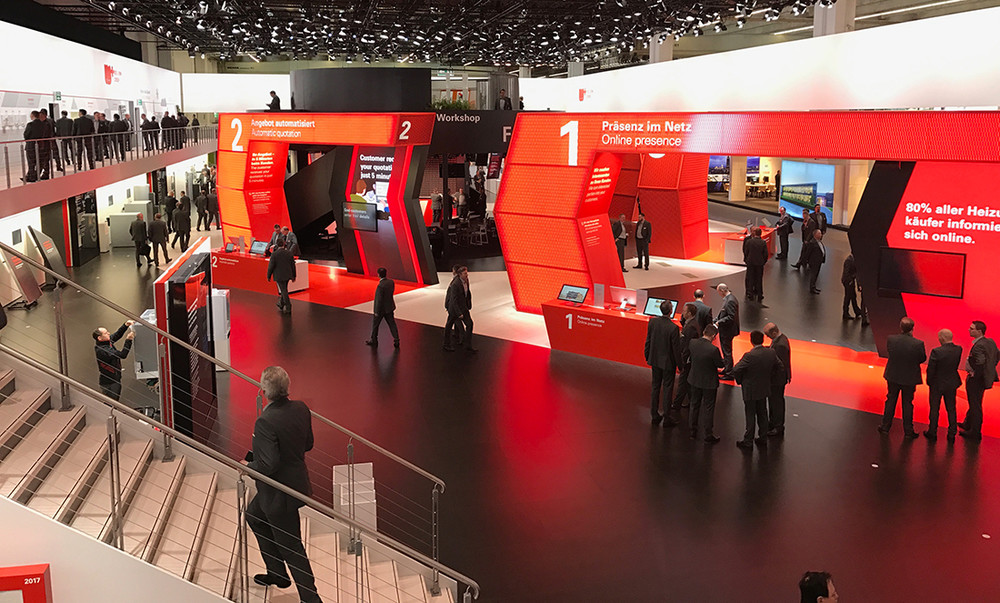 Der Viessmann Messestand auf der ISH 2017.